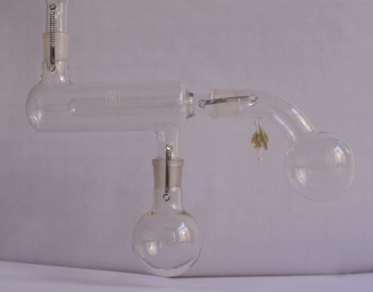 Detailbild des Doppelmantels und des Trockenmittelkolbens mit Vakuumhahn einer Trockenpistole nach Abderhalden